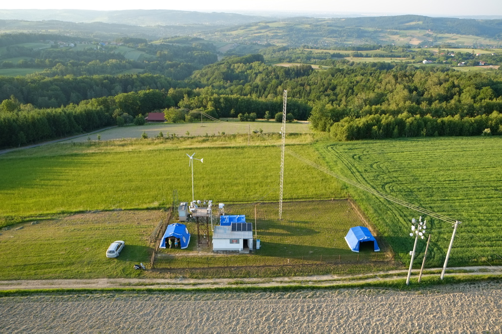 Widok na stacje badawczą z lotu ptaka